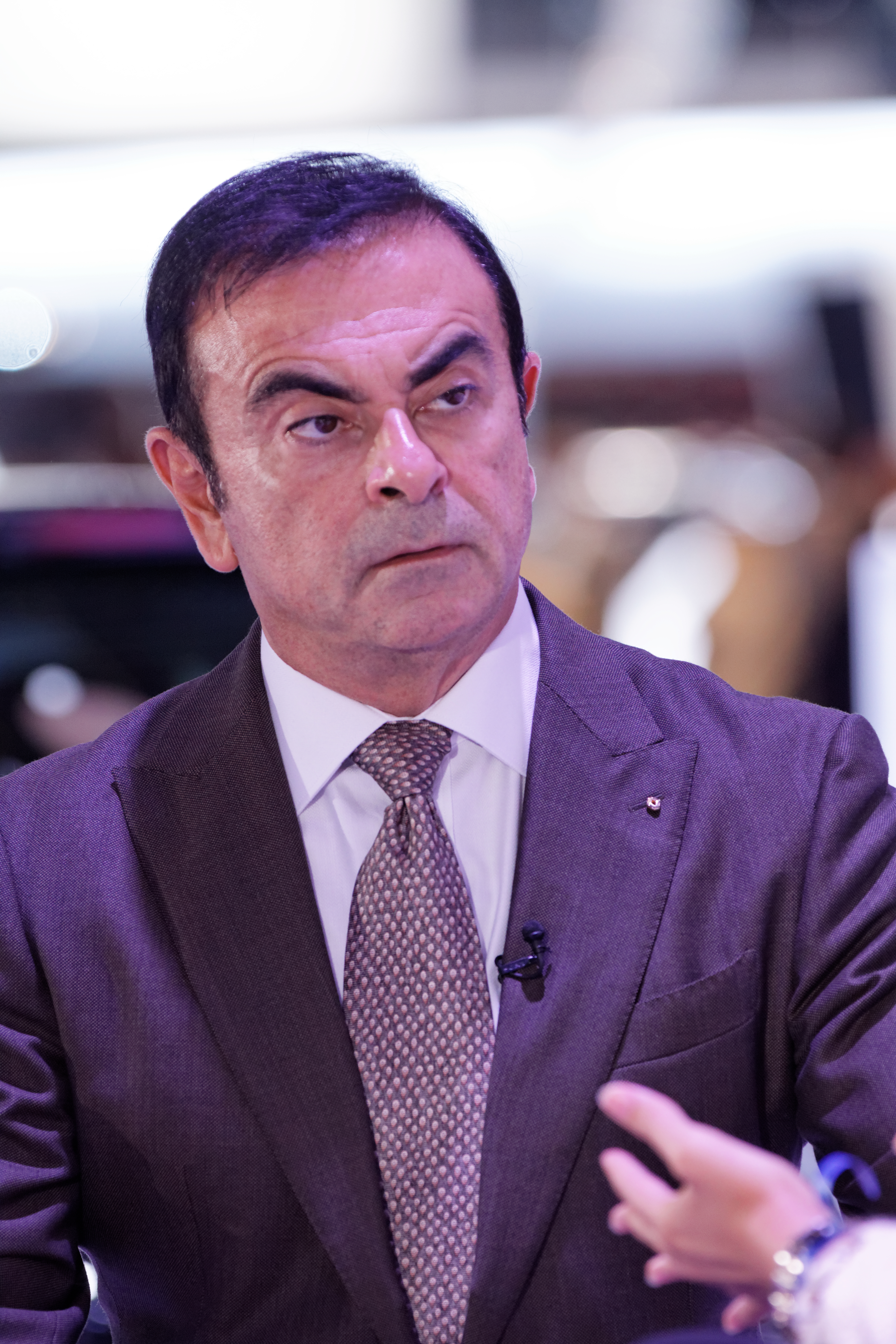 Carlos Ghosn interviewé lors du Mondial de l'Automobile de Paris 2012.